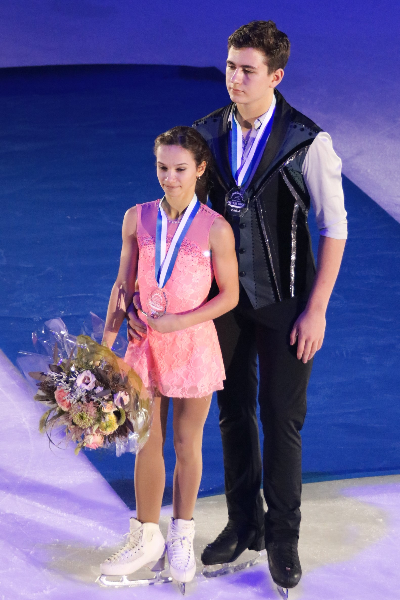 Дарья Павлюченко / Денис Ходыкин (Россия) на церемонии награждения Гран-при Хельсинки 2018.